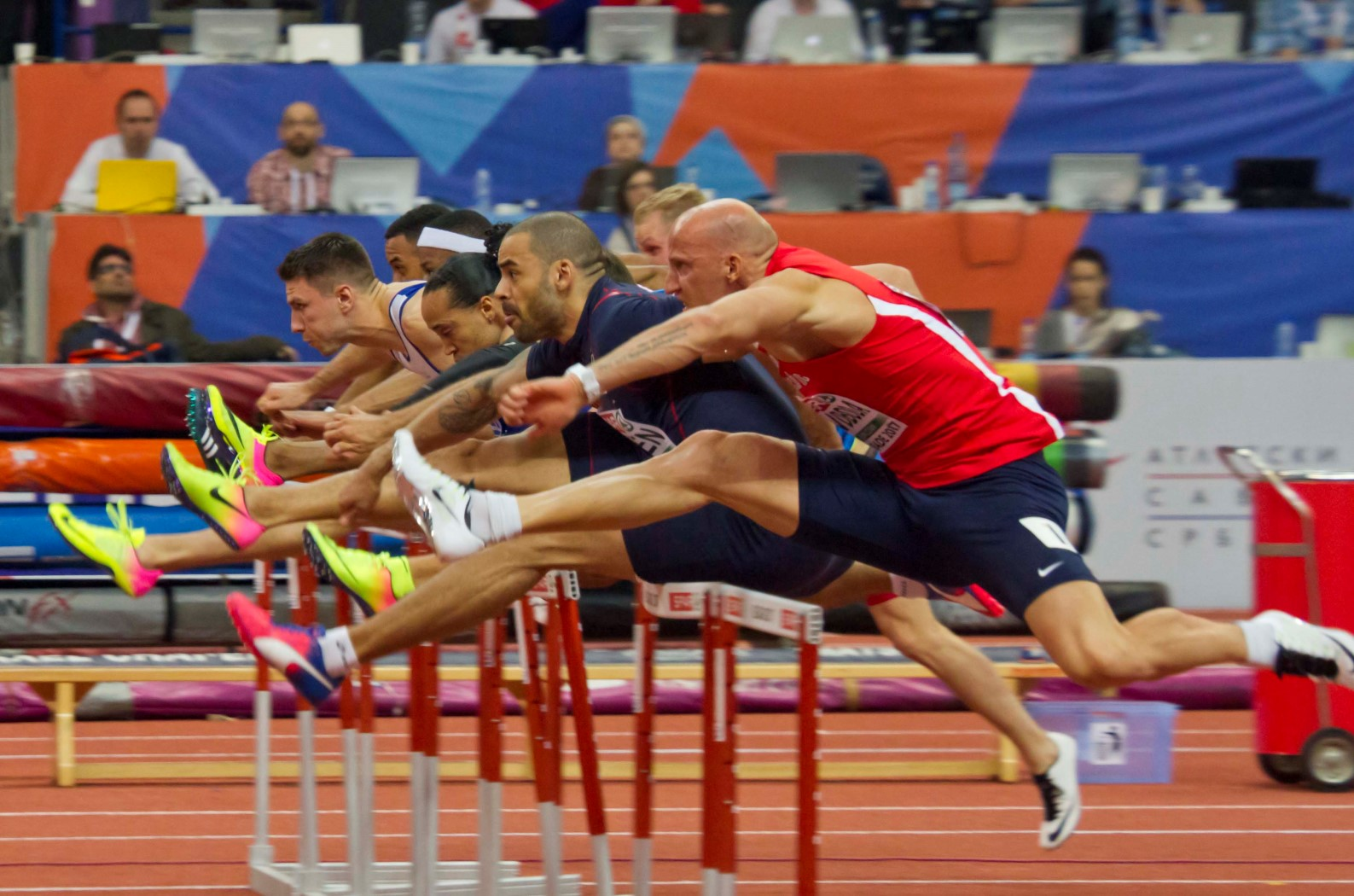 _347 finale 60mH man